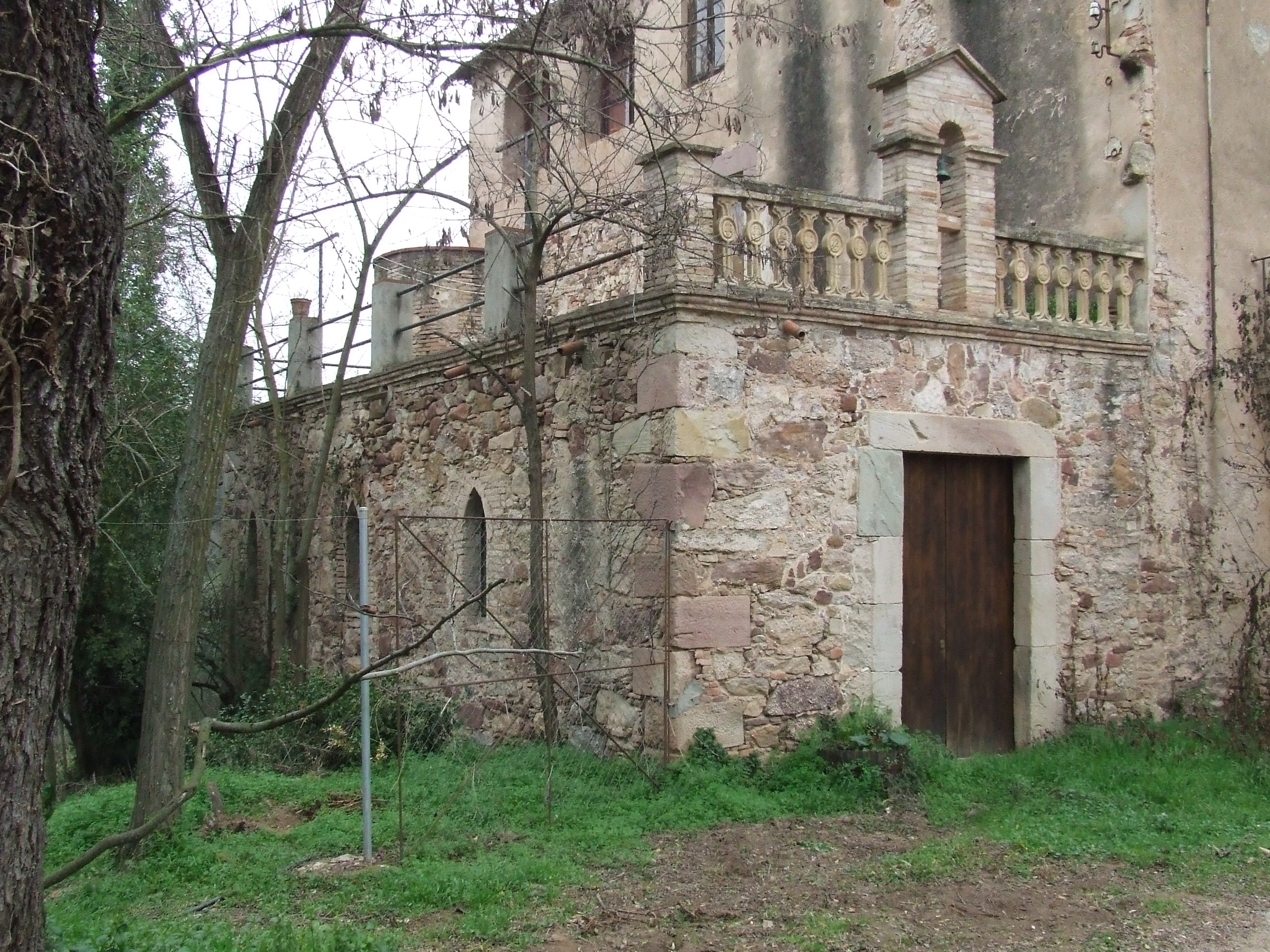 La Mare de Déu de Can Masponç (Bigues, Bigues i Riells, Vallès Oriental)